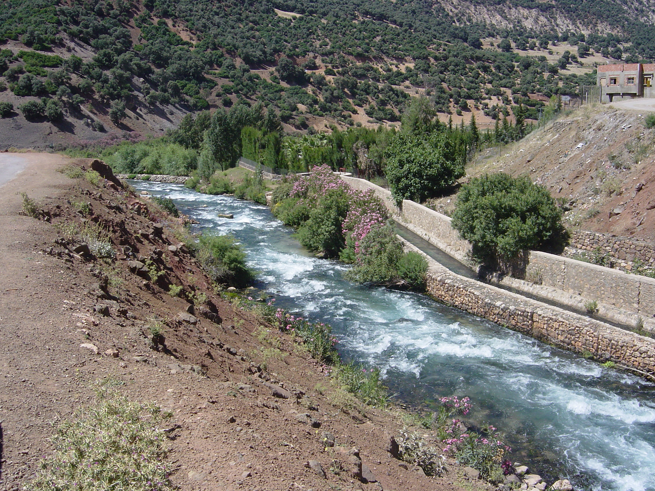 Sources de Oum Er R'bia MAROC